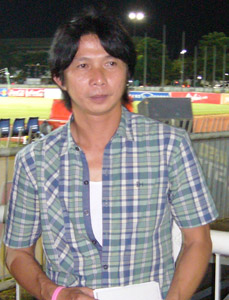 Dusit Chalermsan